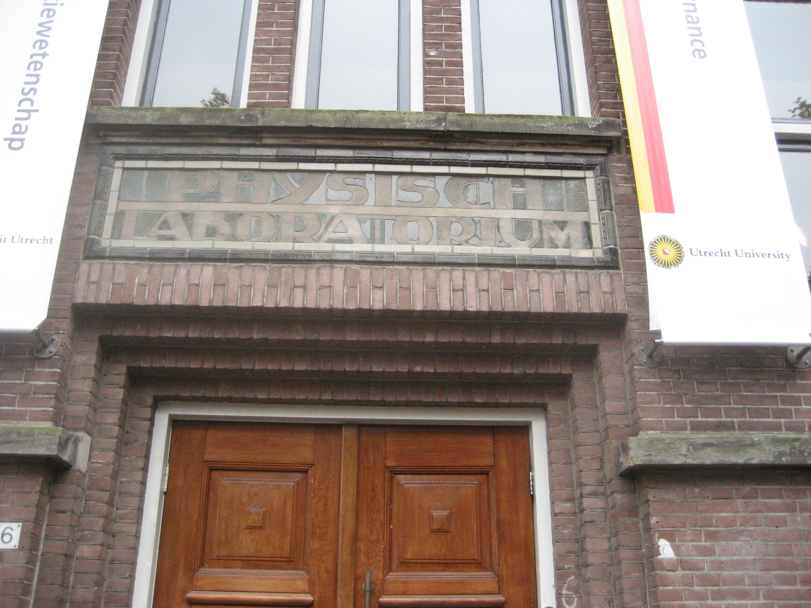 Voormalig Physisch Laboratorium Utrecht, anno 2016 Utrechtse School voor Bestuurs- en Organisatiewetenschap (USBO). Bijlhouwerstraat 8, Utrecht (Nederland)